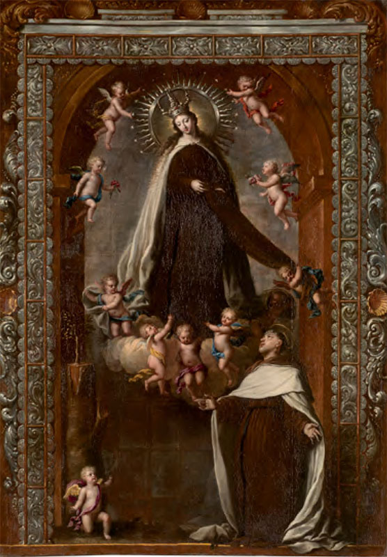 La obra representa a la Virgen del Carmen entregando su escapulario al religioso carmelita inglés San Simón Stock. El óleo está firmado al dorso: «Gabriel Antonio / Couxvoisiex Facit / Anno 1697», y fue adquirido por el Museo del Prado en 2018.